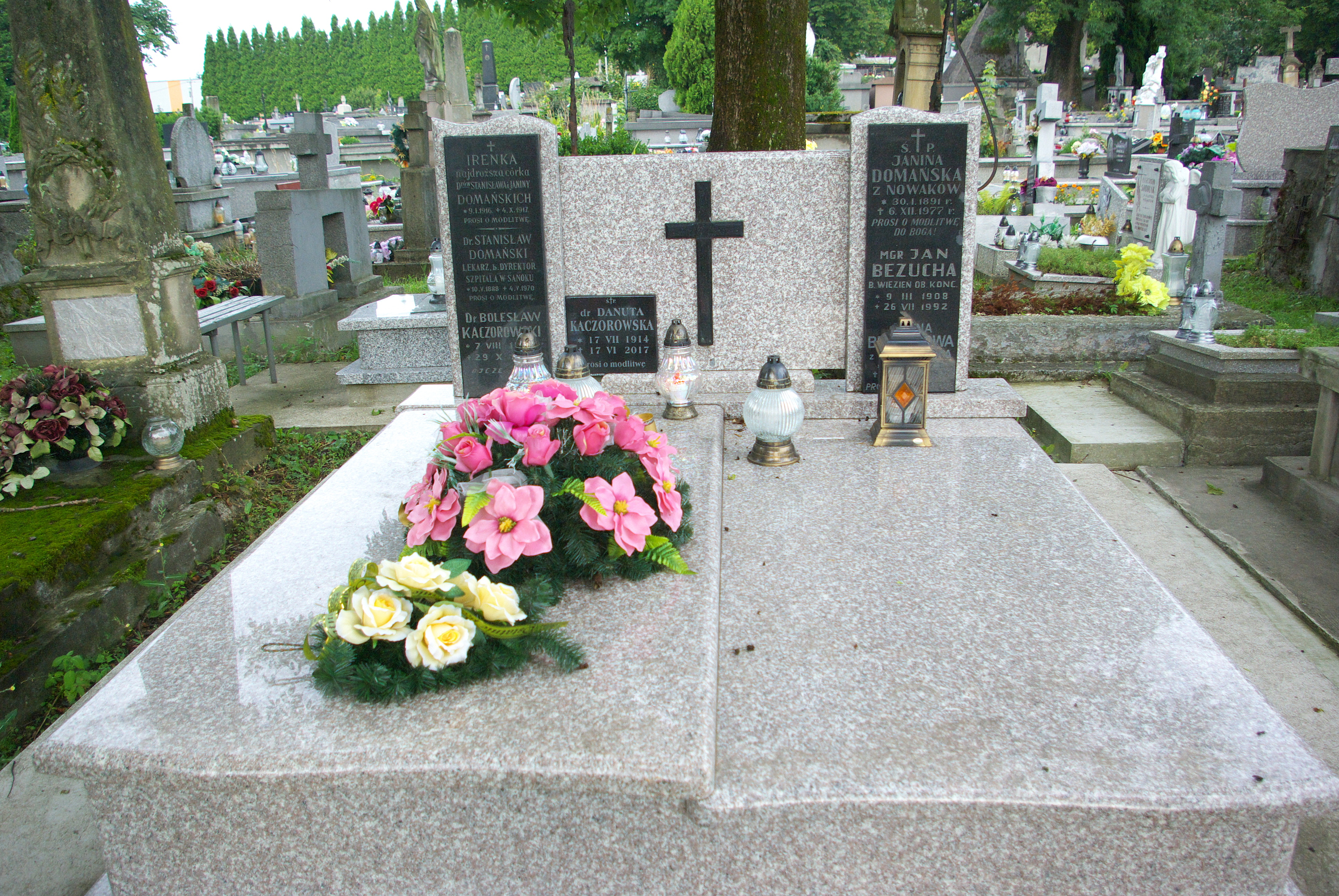 Grobowiec rodzin Domańskich i Bezuchów na Cmentarzu Centralnym w Sanoku. Pochowana w tym miejscu Danuta Kaczorowska zmarła w 2017.